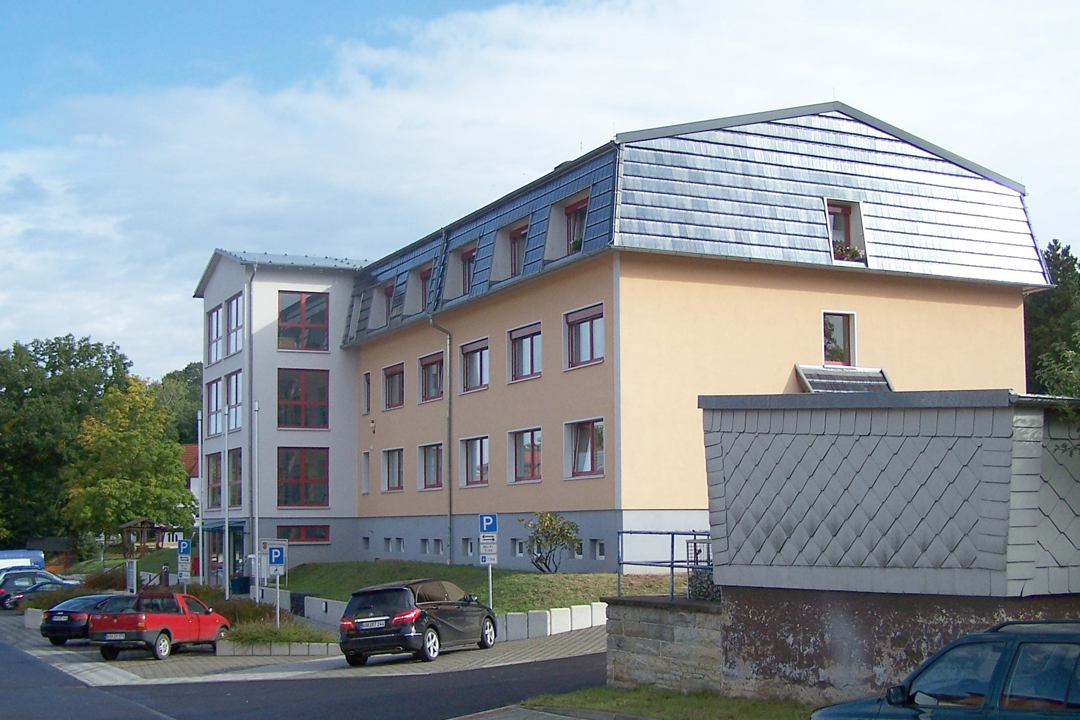 Die Gemeindeverwaltung Unterbreizbach in der Heinrich-Heine-Straße in Räsa.